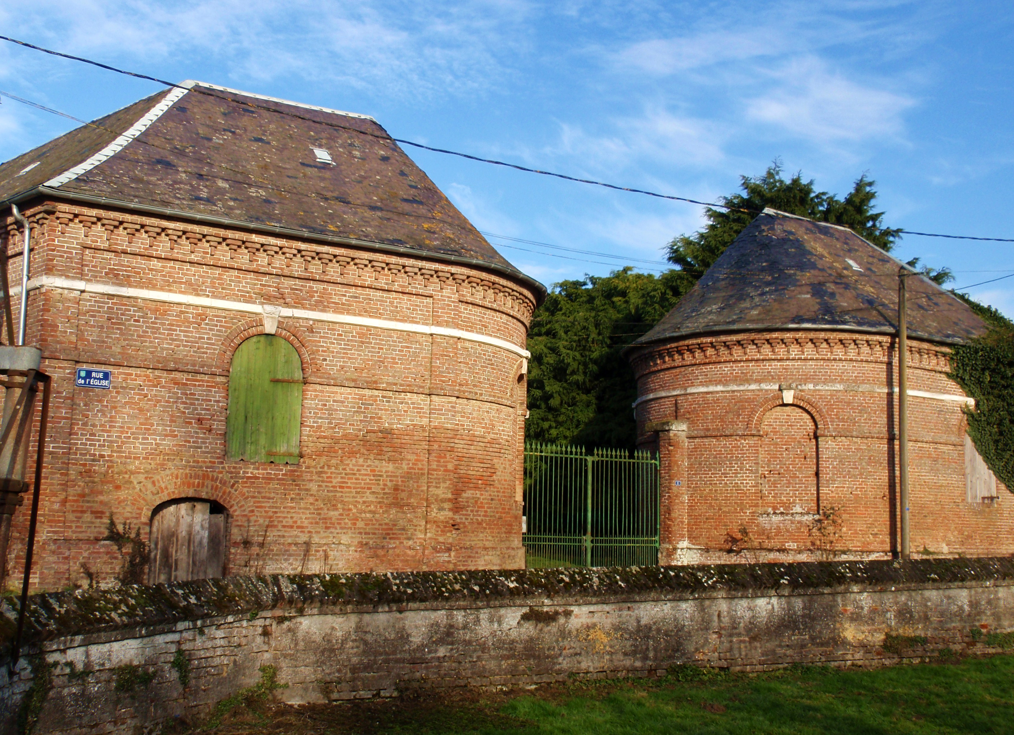 Brucamps (Somme, France). L'entrée d'une cour de ferme, derrière le mur de l'ancienne mare.